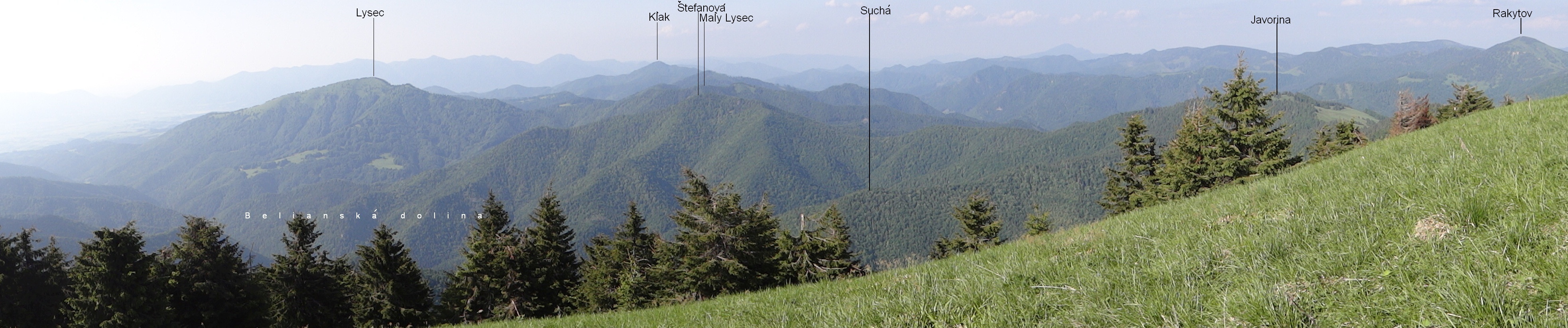 View from Borišov